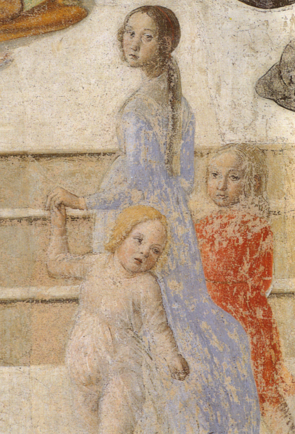 Cappella del miracolo, cosimo rosselli, miracolo del calice, dettaglio